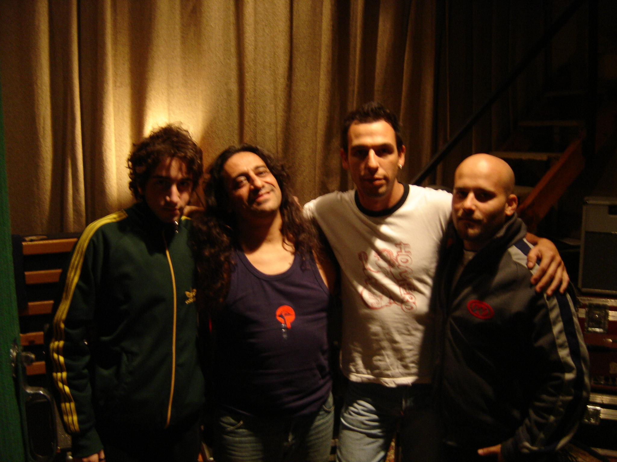 MAM-(Cotton-Mollo-Marino)junto a Piti Fernandez(Los Piojos)Grabación 2do.disco de MAM-Lo Vés-2005.